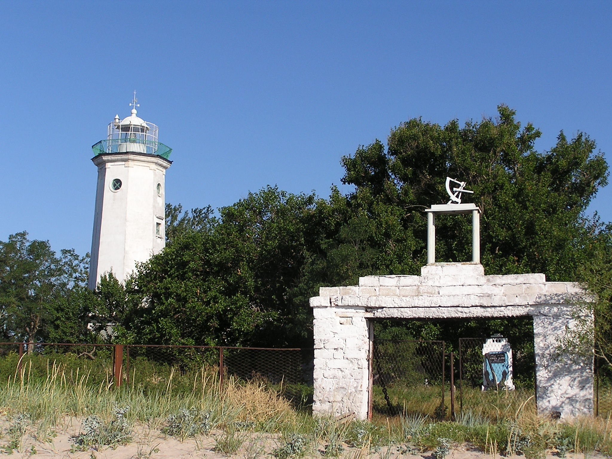 Белосарайская коса